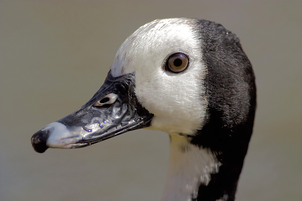 Witwenpfeifgans